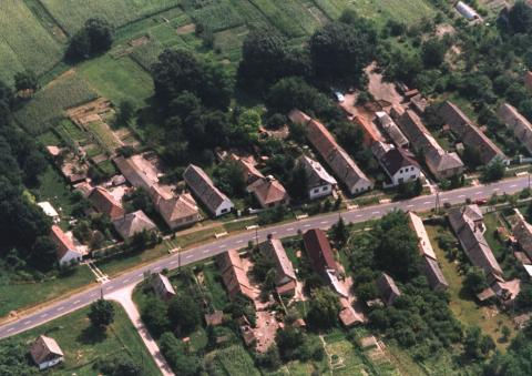 Bakonygyirót, Hungary, aerial photography